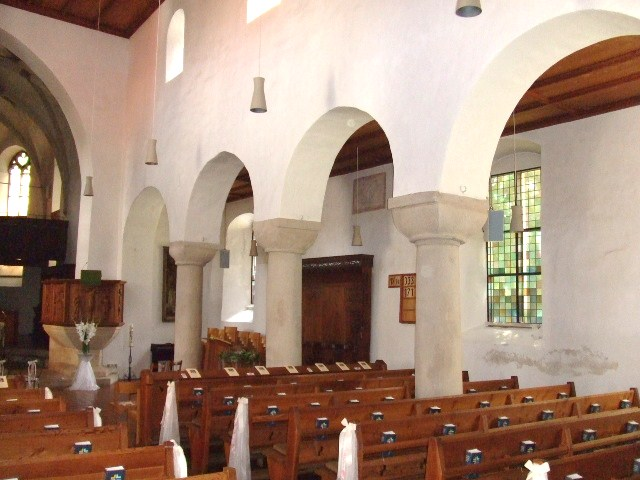 Ev. Martinskirche Oberlenninge, Gemeinde Lenningen, Landkreis Esslingen